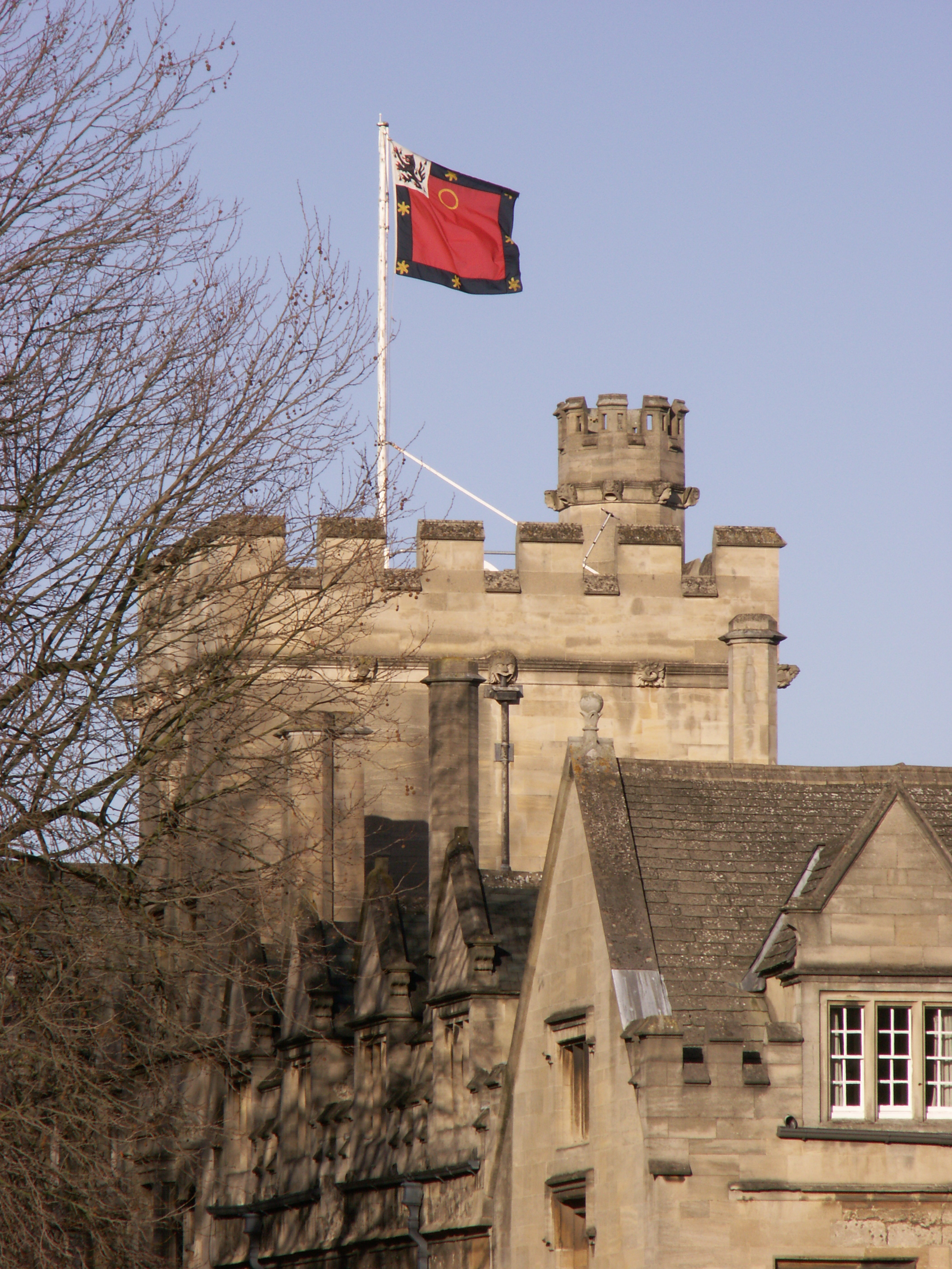 Flag flying over St John's College